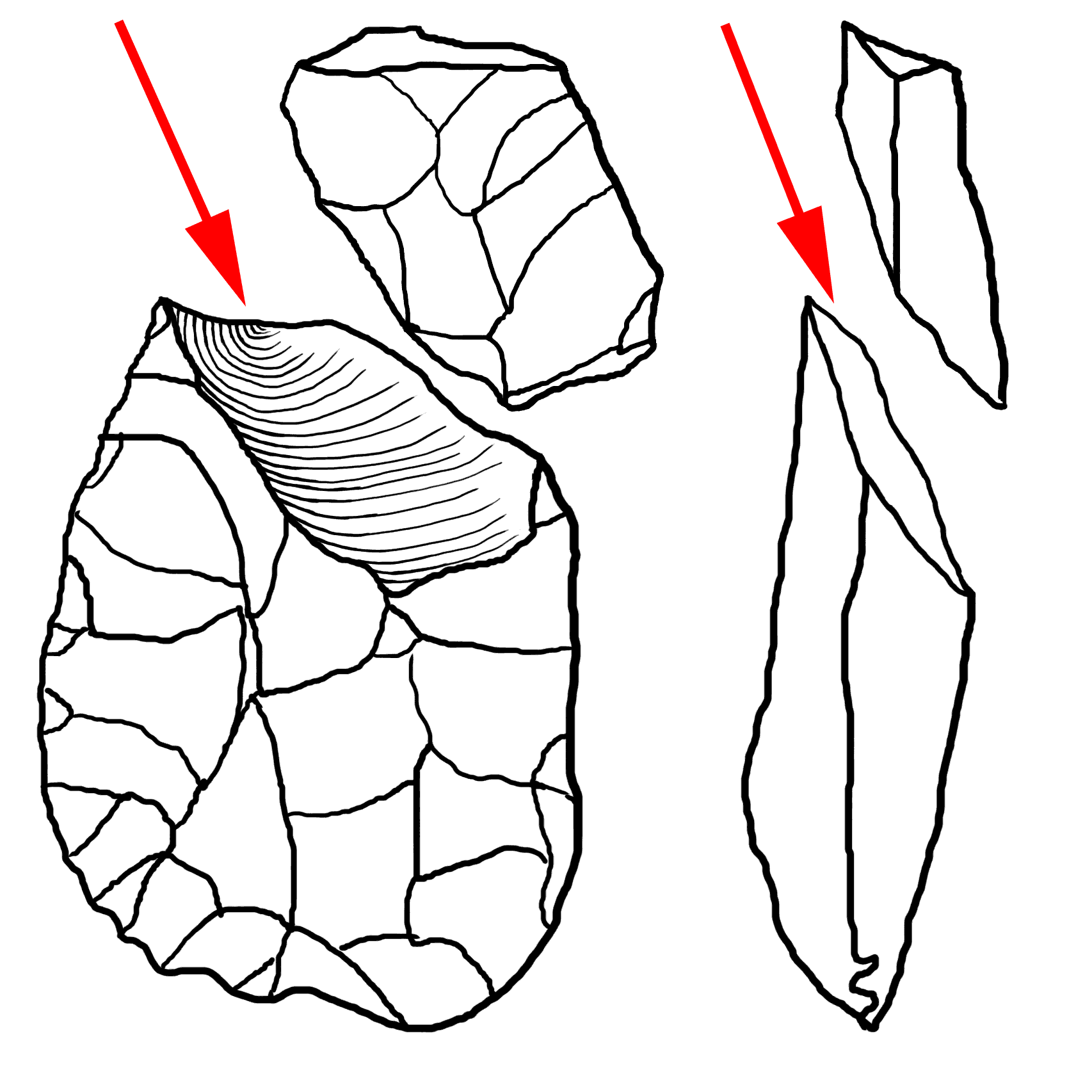 Coup de Tranchet